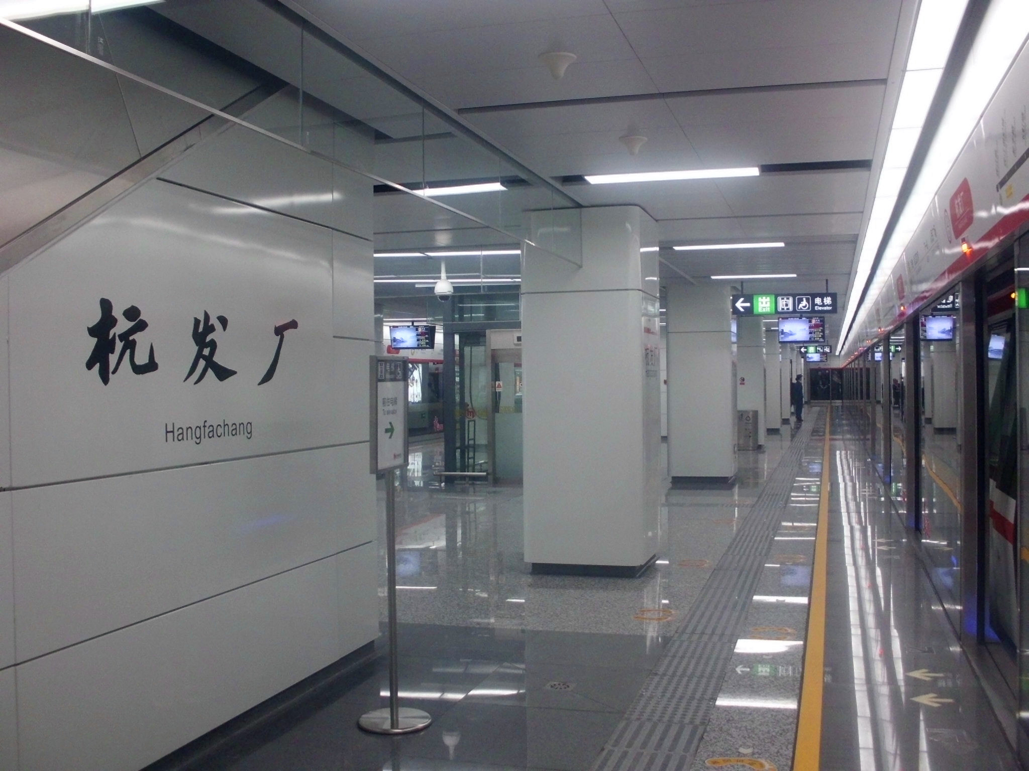 2号线杭发厂站